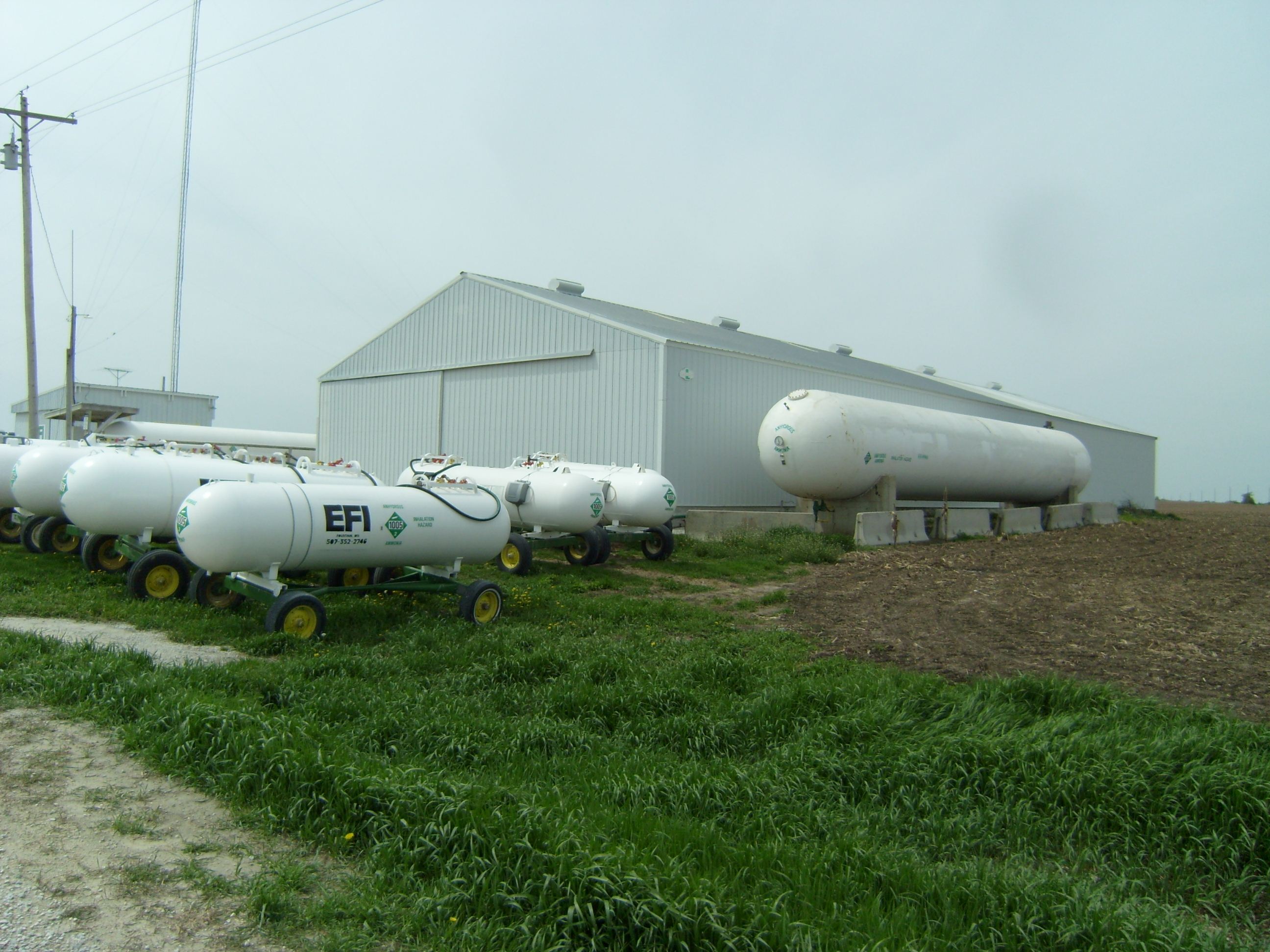 Station de stockage d'ammoniac anhydre pour engrais aux États-Unis, comprenant une cuve de stockage fixe et plusieurs « nourrices », remorques agricoles équipée de citernes servant à livrer le gaz liquéfié dans les exploitations agricoles.